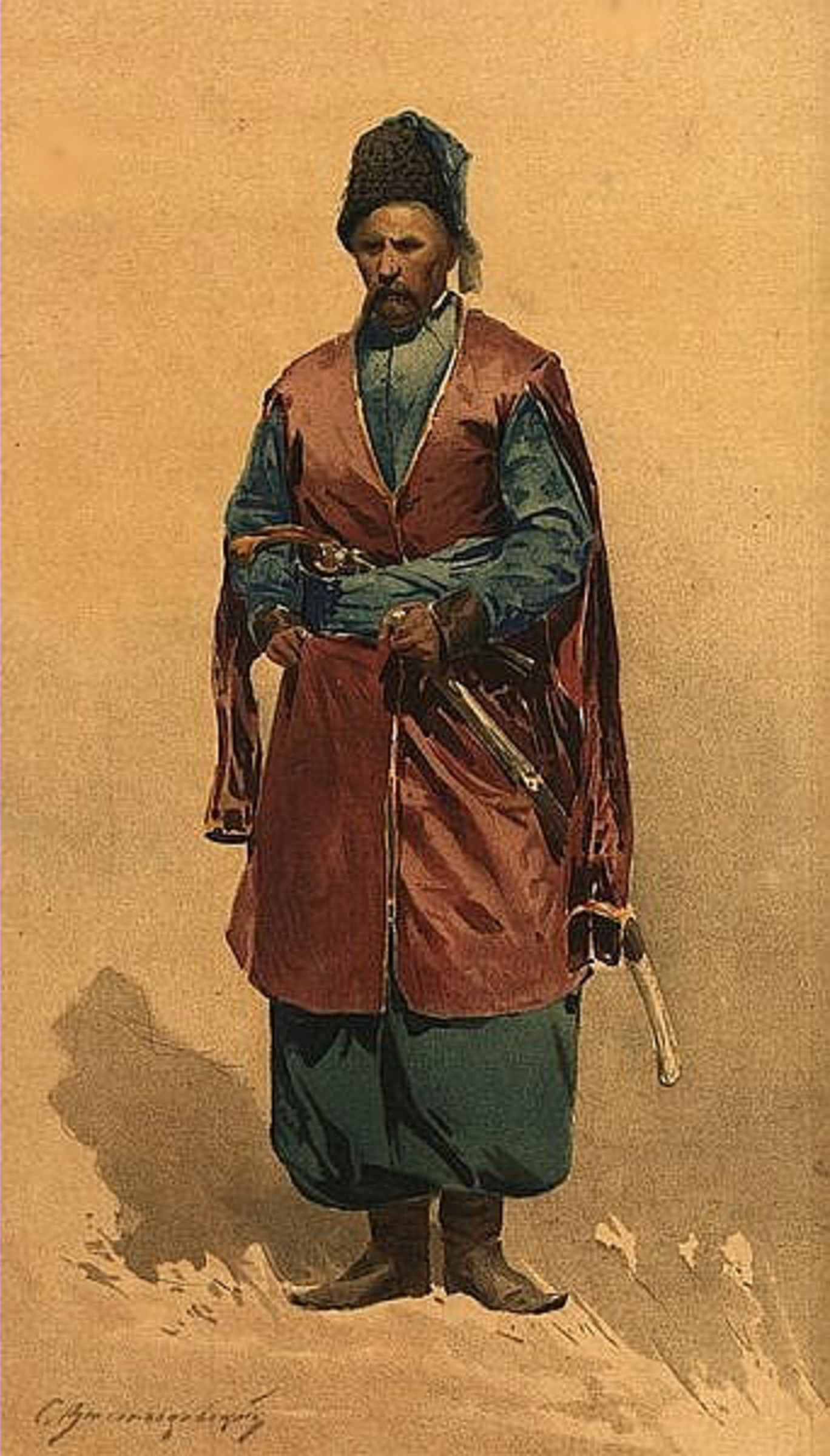 Полковник реєстрового лівобережного полку у кунтуші. Cossack colonel of registered regimet from the left-bank Ukraine (18c.). Акварель. 1900 р.